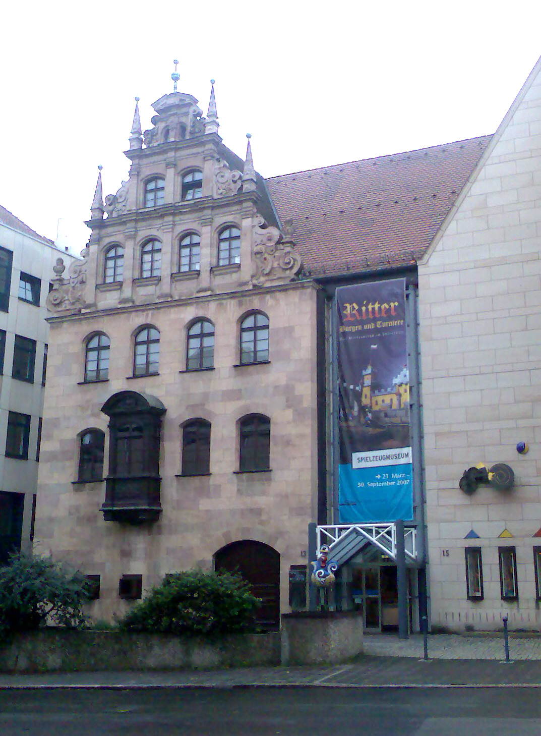 Spielzeugmuseum Nürnberg - ehemals Stadthaus der Haller von Hallerstein - Nürnberg - Karlstraße 13-15